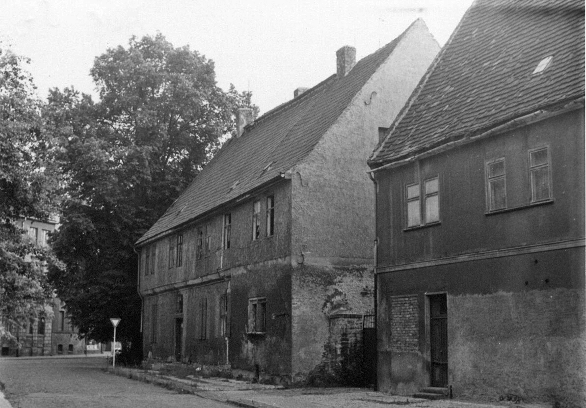 August 1987. Links ist das Terminierhaus „Kirchstraße 2“ (Dominikaner-Bettelmönche) und rechts das Terminierhaus „Kirchstraße 3“ (Augustiner-Bettelmönche) zu sehen. Bis 1981 war das Terminierhaus der Dominikaner noch bewohnt.